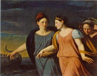 Похищение Елены Парисом. На сюжет из «Илиады» Гомера